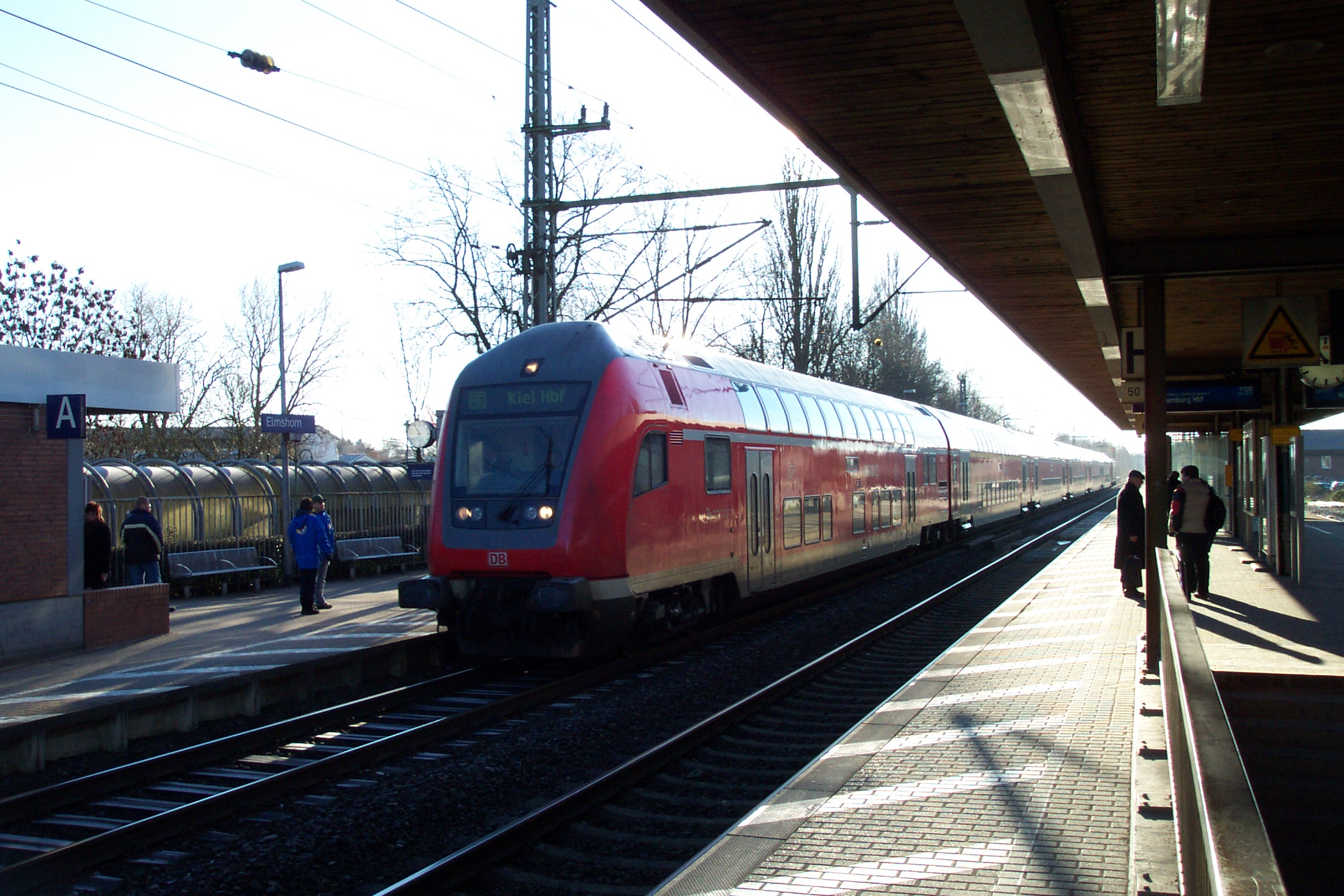 Einfahrt eines Regional-Expresses nach Kiel Hbf in den Elmshorner Bahnhof